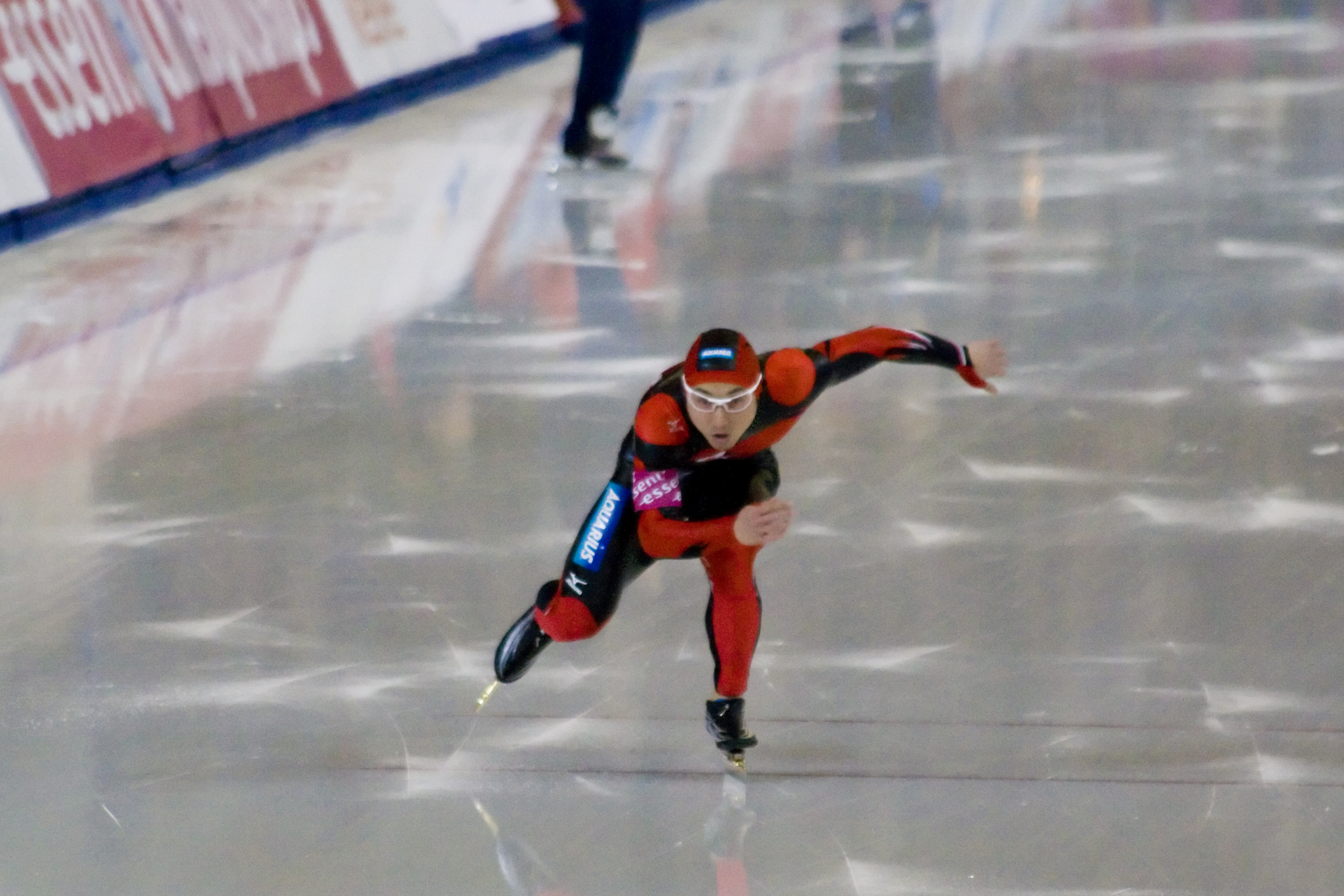 Yuya Oikawa